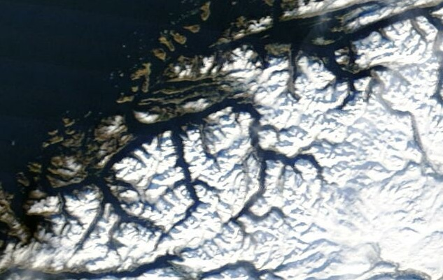 Vinterklimaet i Haram februar 2003